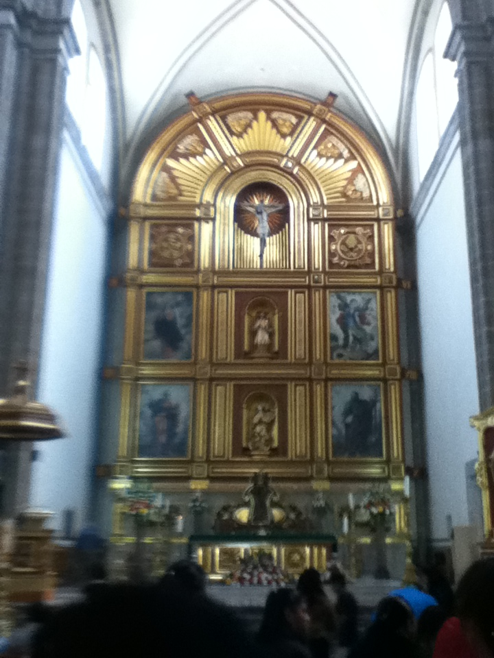 Interior de la Catedral